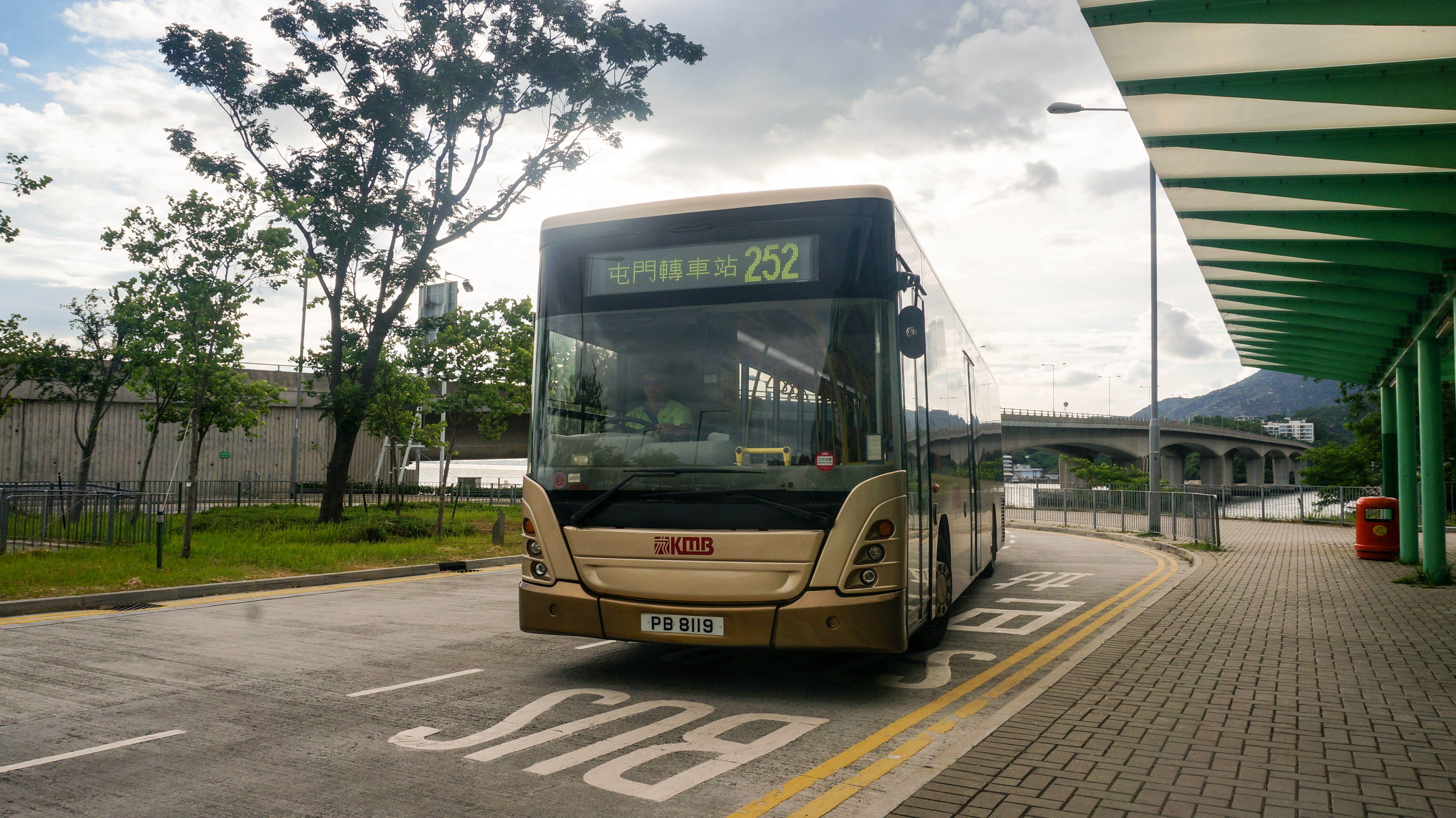 ASC28為252線用車之一